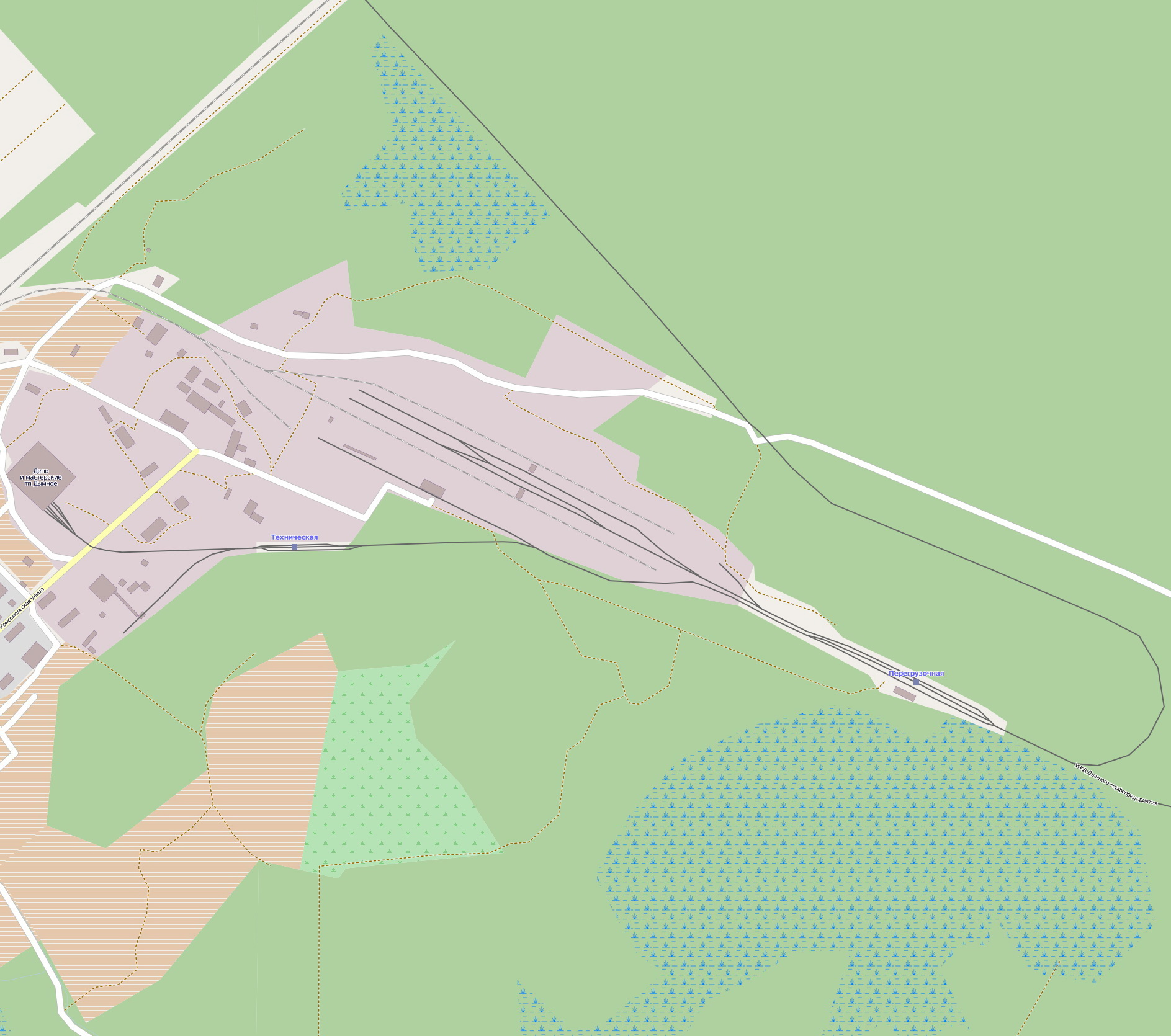 Узкоколейная железная дорога Дымного торфопредприятия